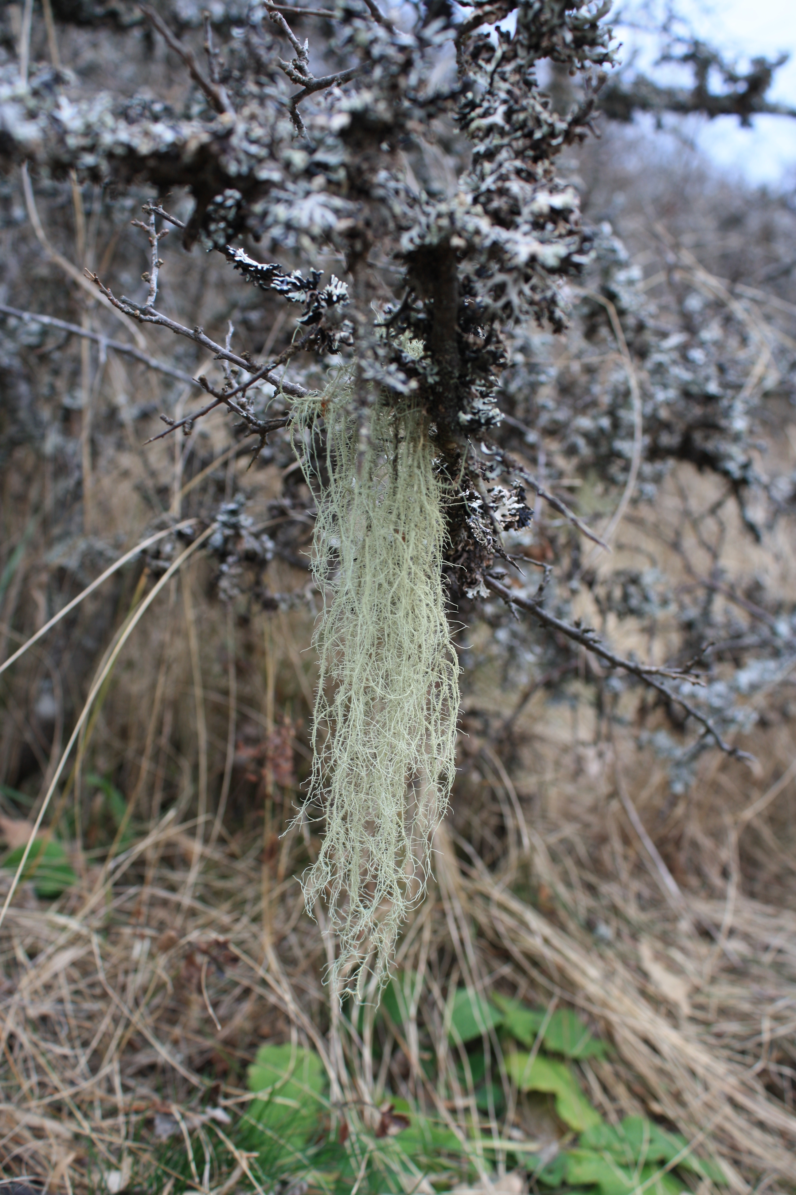 bradatec